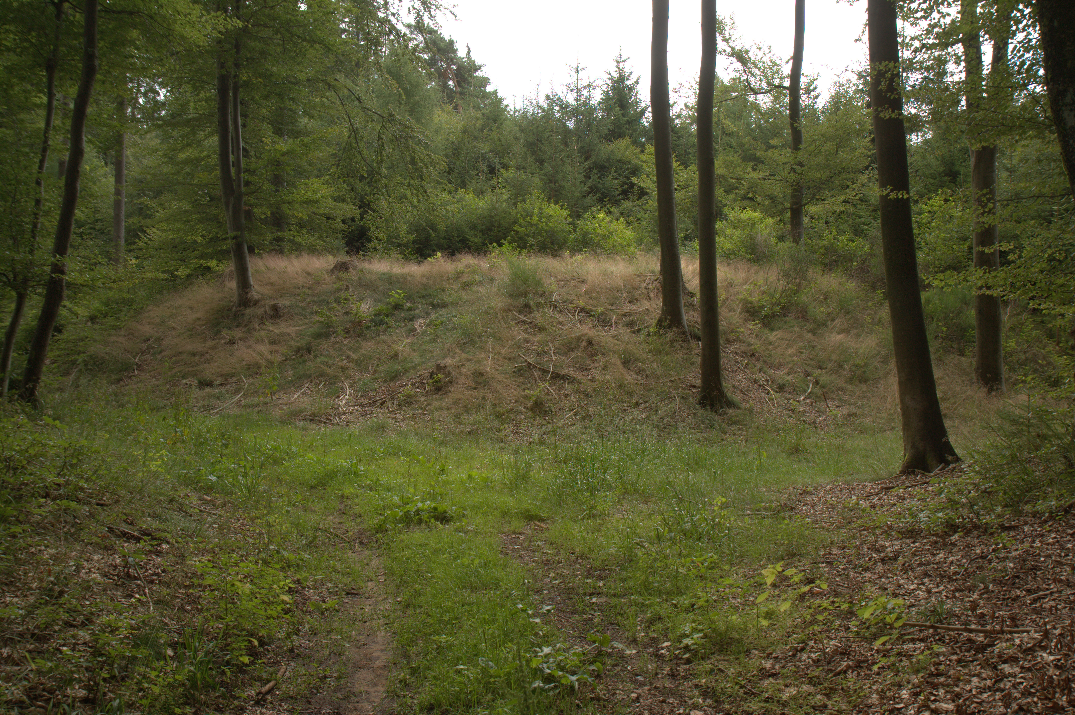 Burgstall Hohenrasch - Burghügel aus nordöstlicher Richtung